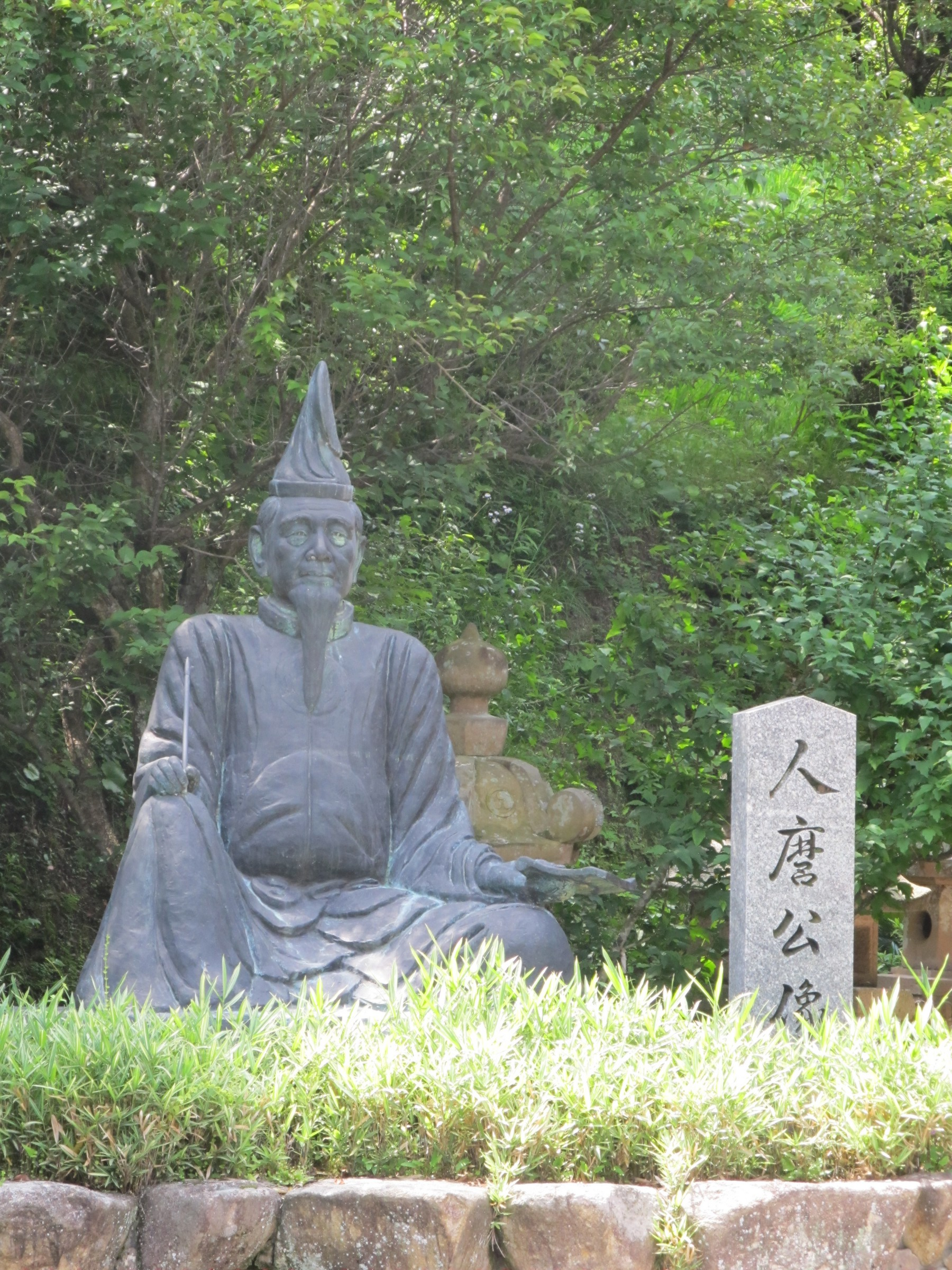 高津柿本神社 人麿公像